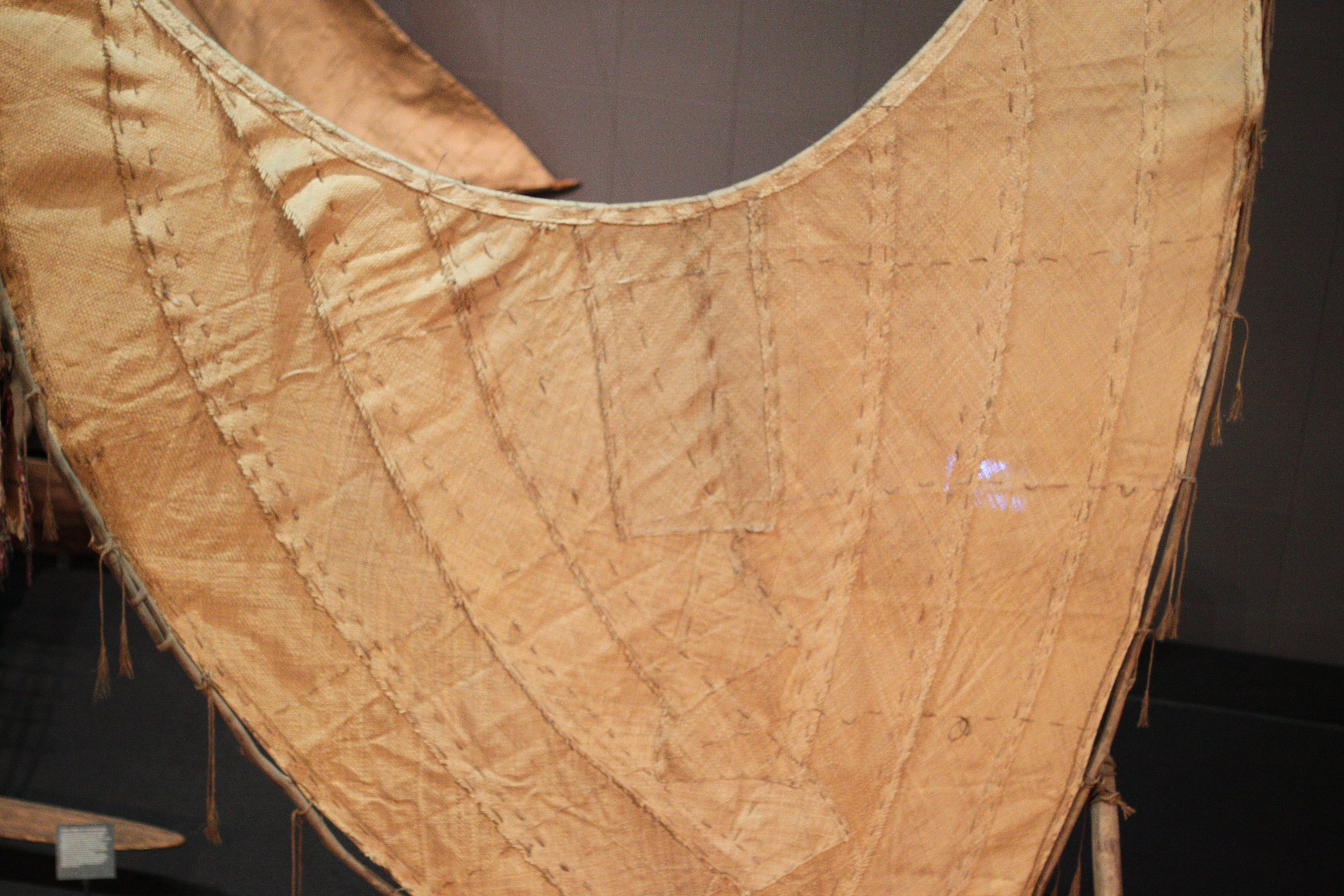 Südseeabteilung im Ethnologischen Museum, Berlin-Dahlem